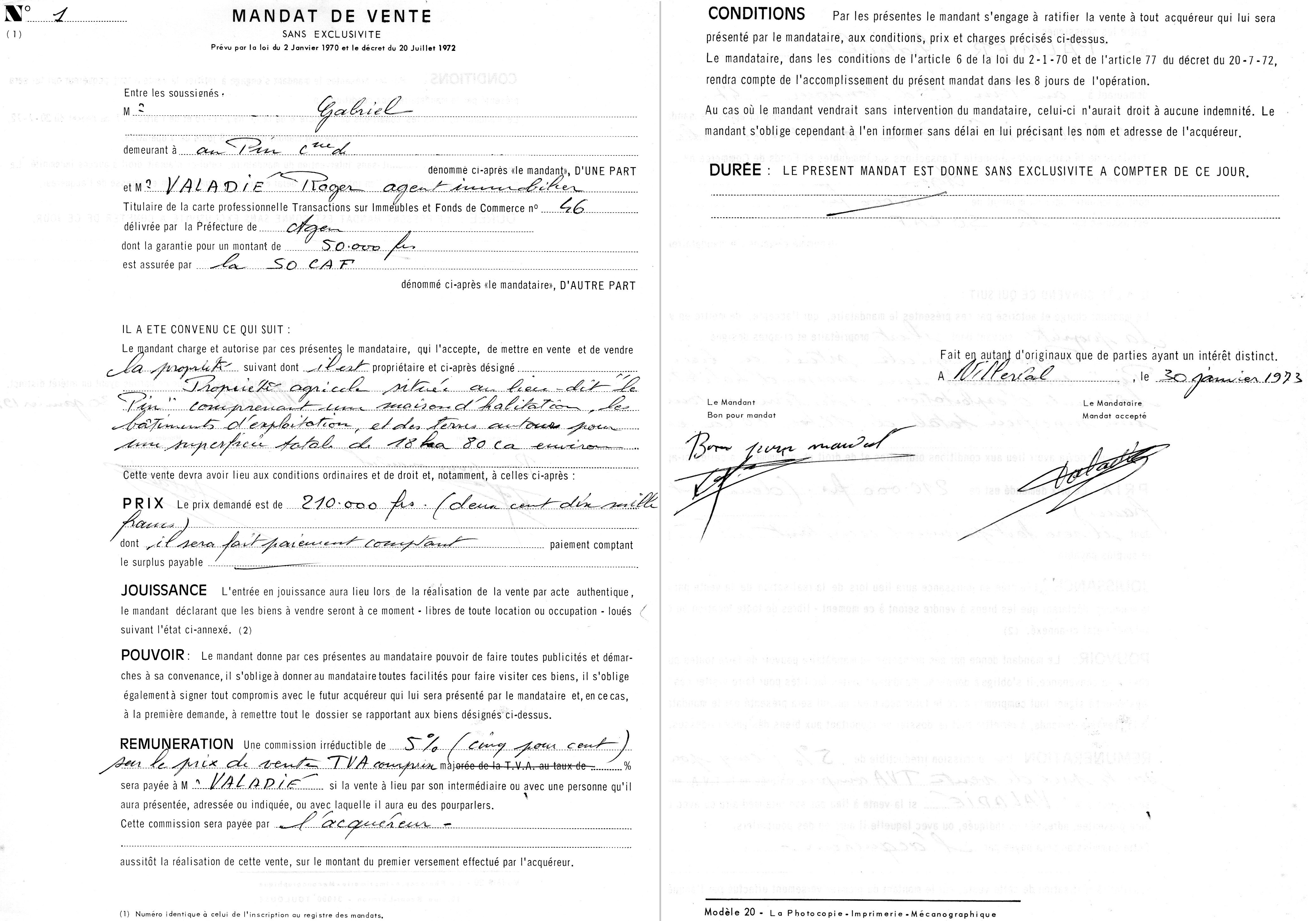 1er mandat créé après la diffusion de la Loi Hoguet en 1970 par l'agence immobilière Valadié.